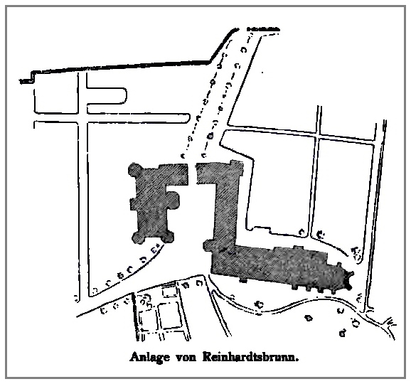 Planskizze von Schloss Reinhardsbrunn.